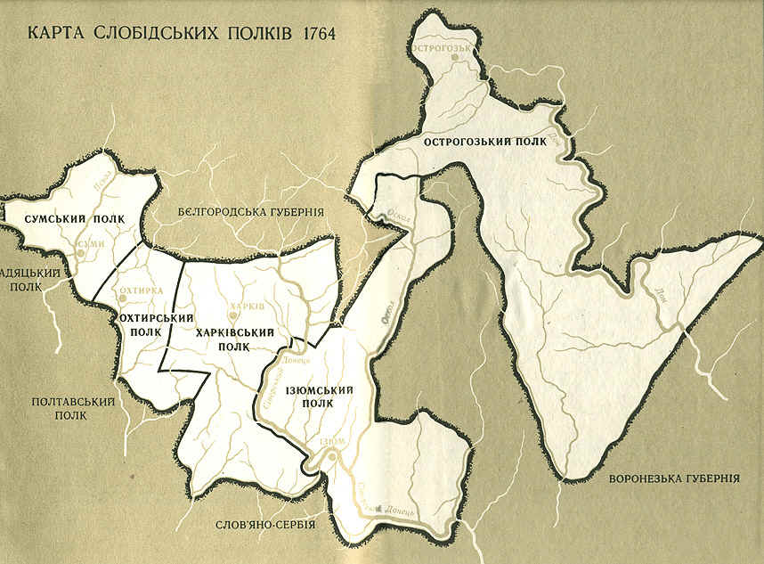 Карта слободских полков по состоянию на конец 17 века, переведённая в 20 веке на украинский язык. Обратите внимание, что в конце 17-начале 18 века века степная территория между Сватовой Лучкой и Меловаткой (ныне Сватово; Изюмский полк) и Старой Белой (ныне Старобельск; Острогожский полк) ещё не заселена и образует причудливую ломаную линию.